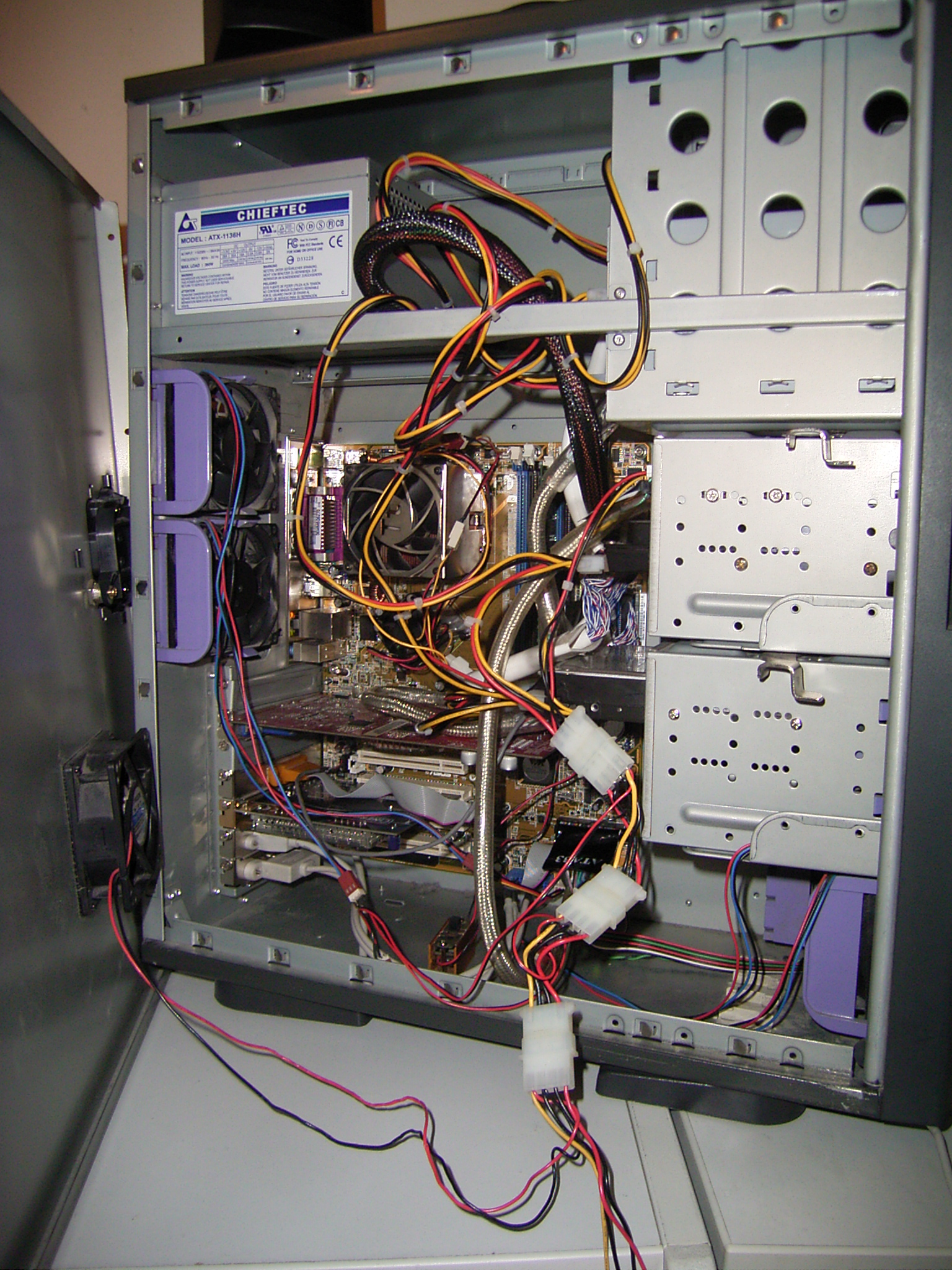 Foto von meinem selbst zusammengebauten PC (innen)